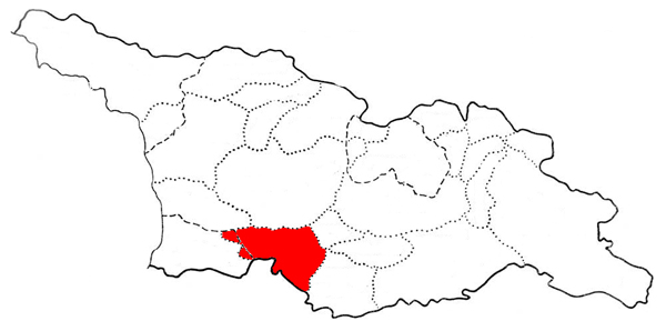 מיקומו של ה מסחתי בגאורגיה